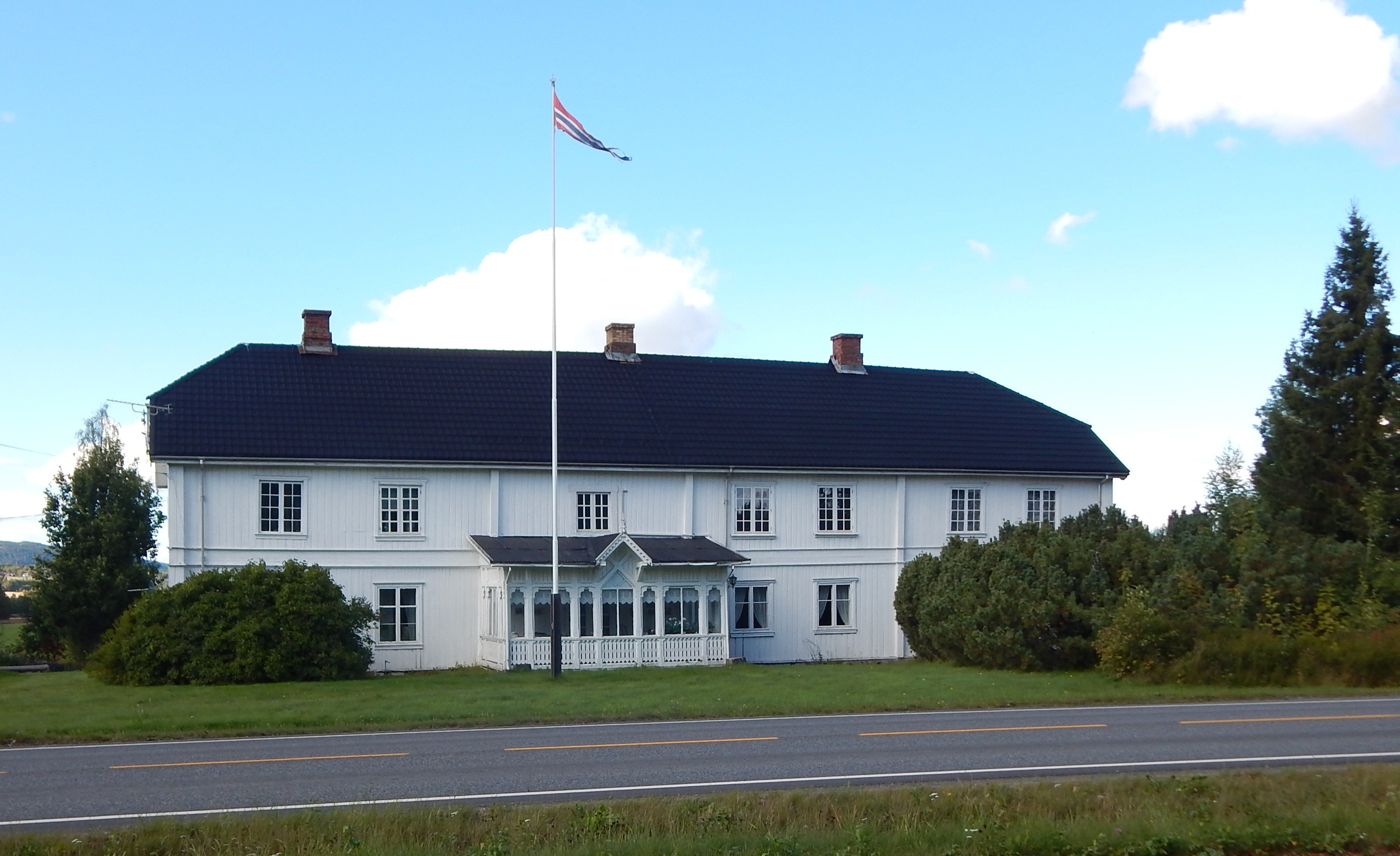 Hovedbygningen ved Kirkenær gård